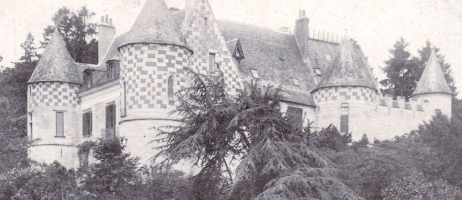 Vue panoramique du château de Châtigny à Fondettes